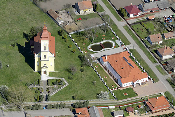 Légi fotó Újszentmargitáról